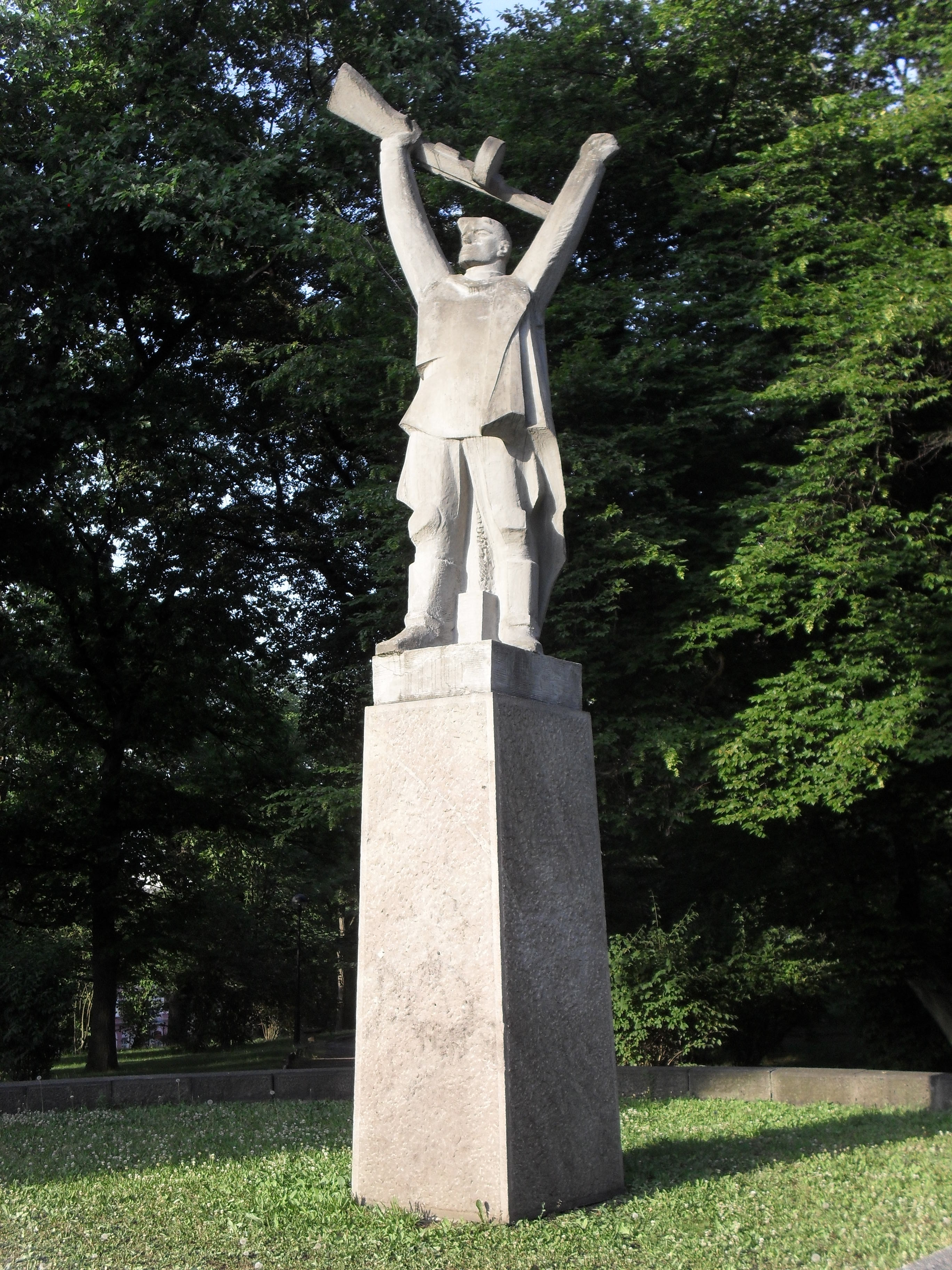 Pomník padlých Sovětských vojáků v Teplicích. Stojí před Teplickou obchodní akademií.